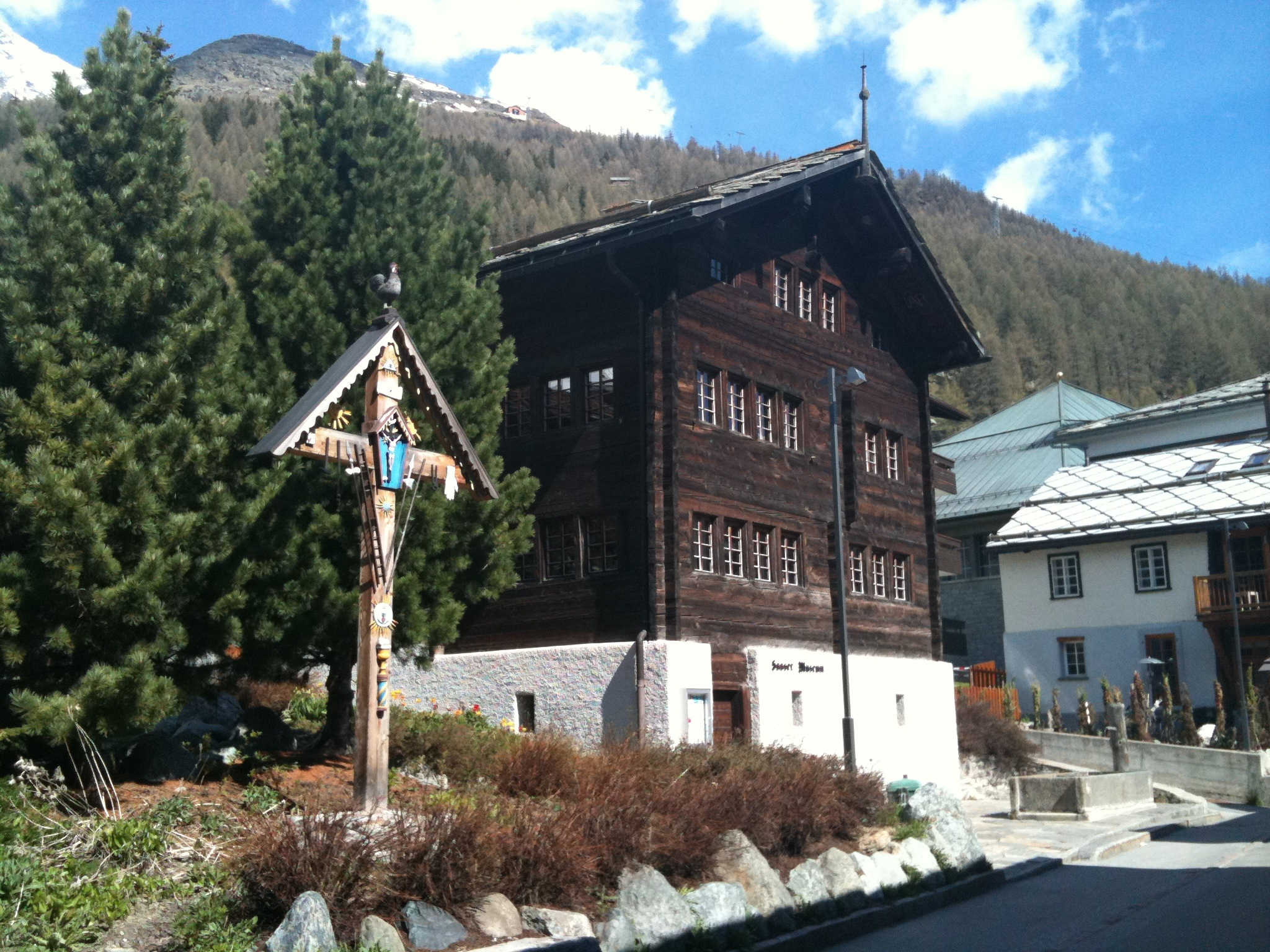 Heimatmuseum Saas-Fee, Kanton Wallis